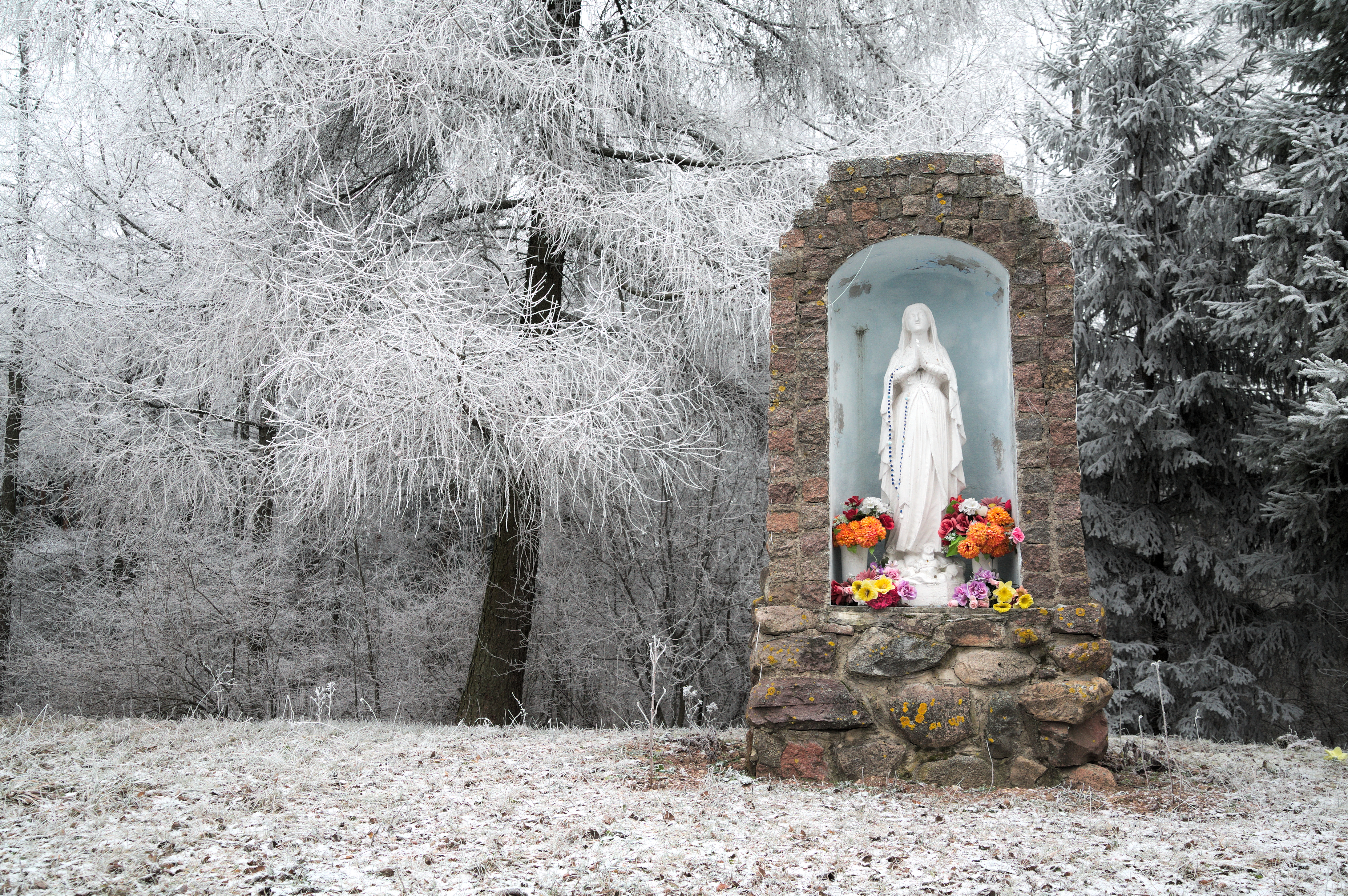 kaplica na górze Krzemieniucha w Żywej Wodzie